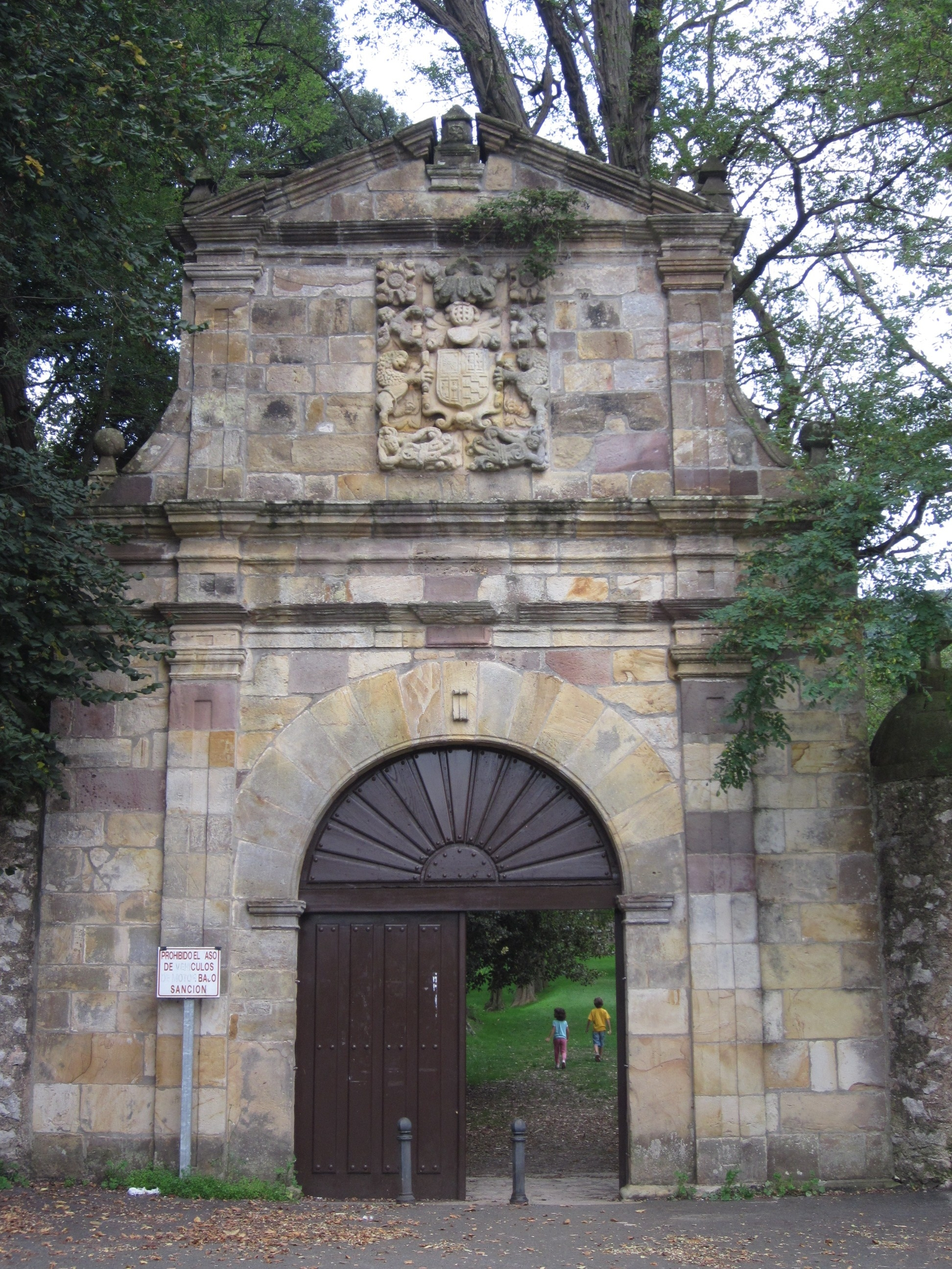 Finca de Riosequillo, portalada de entrada al parque